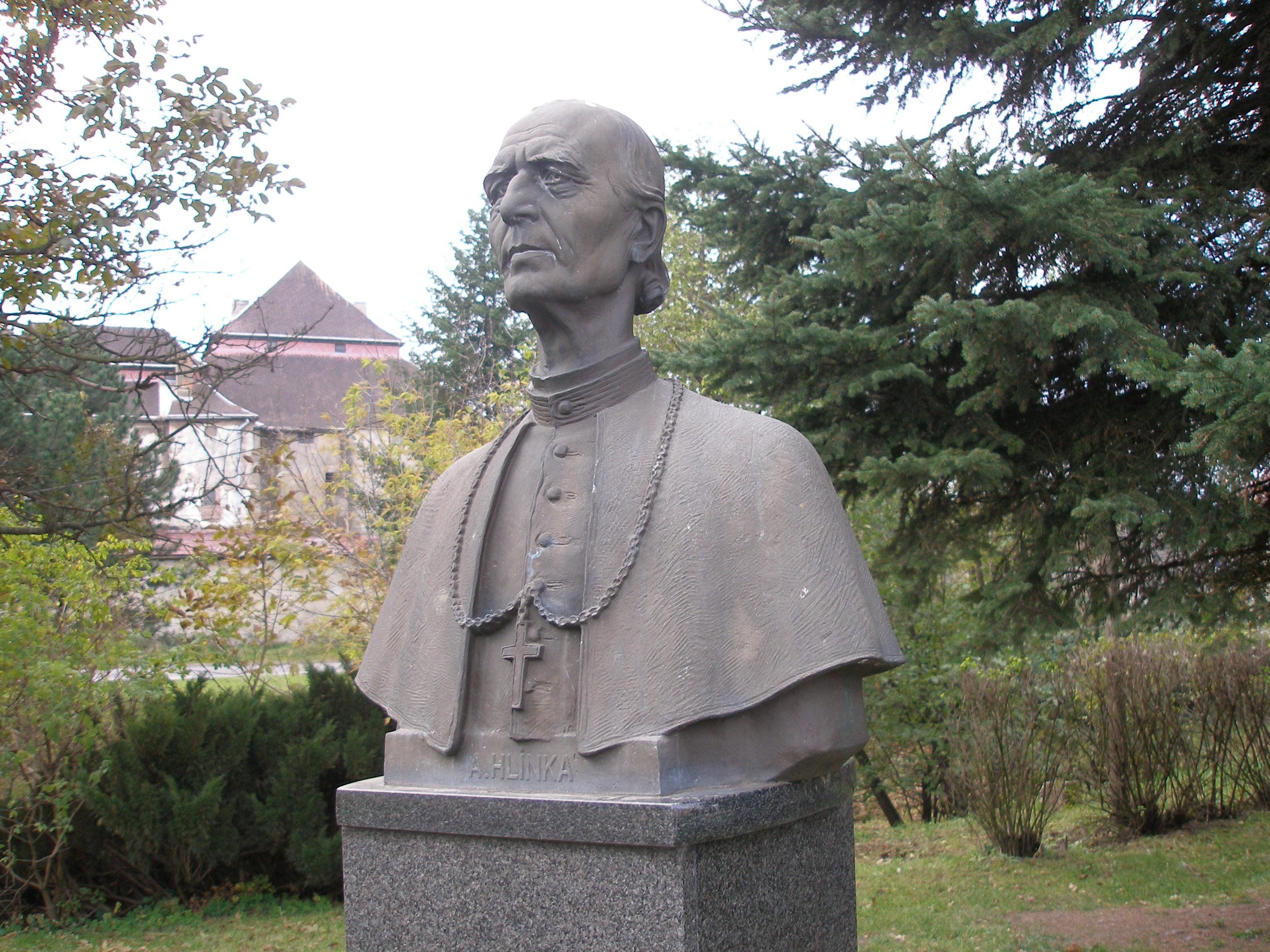 Detail. Pamätník Andreja Hlinku v Nižnej Šebastovej mestská časť Prešov